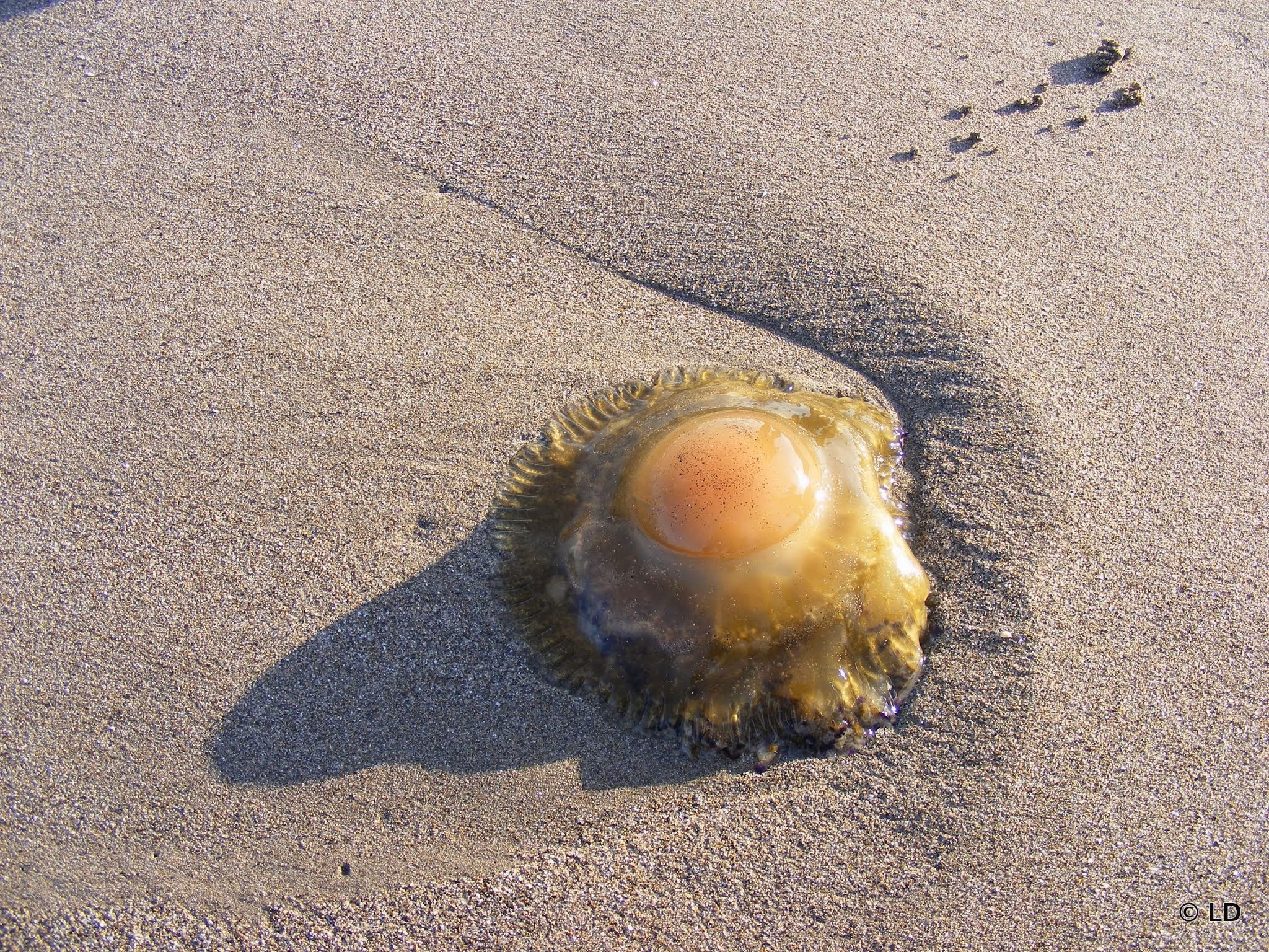 Mediterranean jelly or fried egg jellyfish